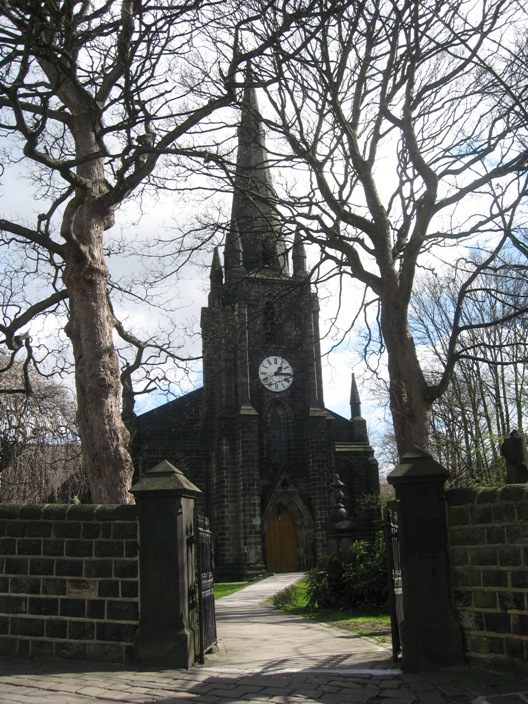 St. Stephen's Church, Kirkstall Leeds